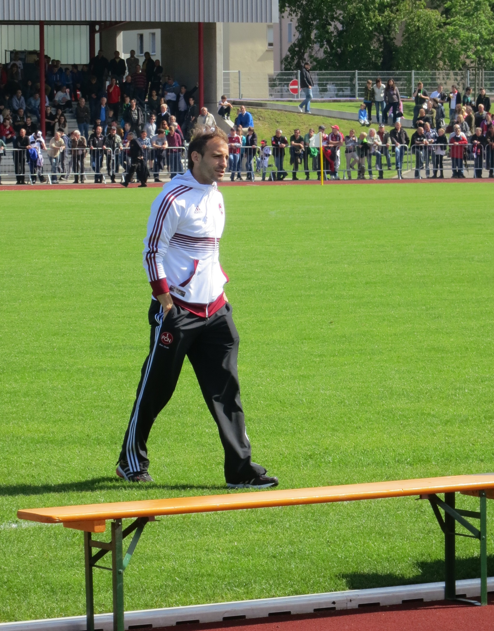 Javier Pinola 2013 in Coburg